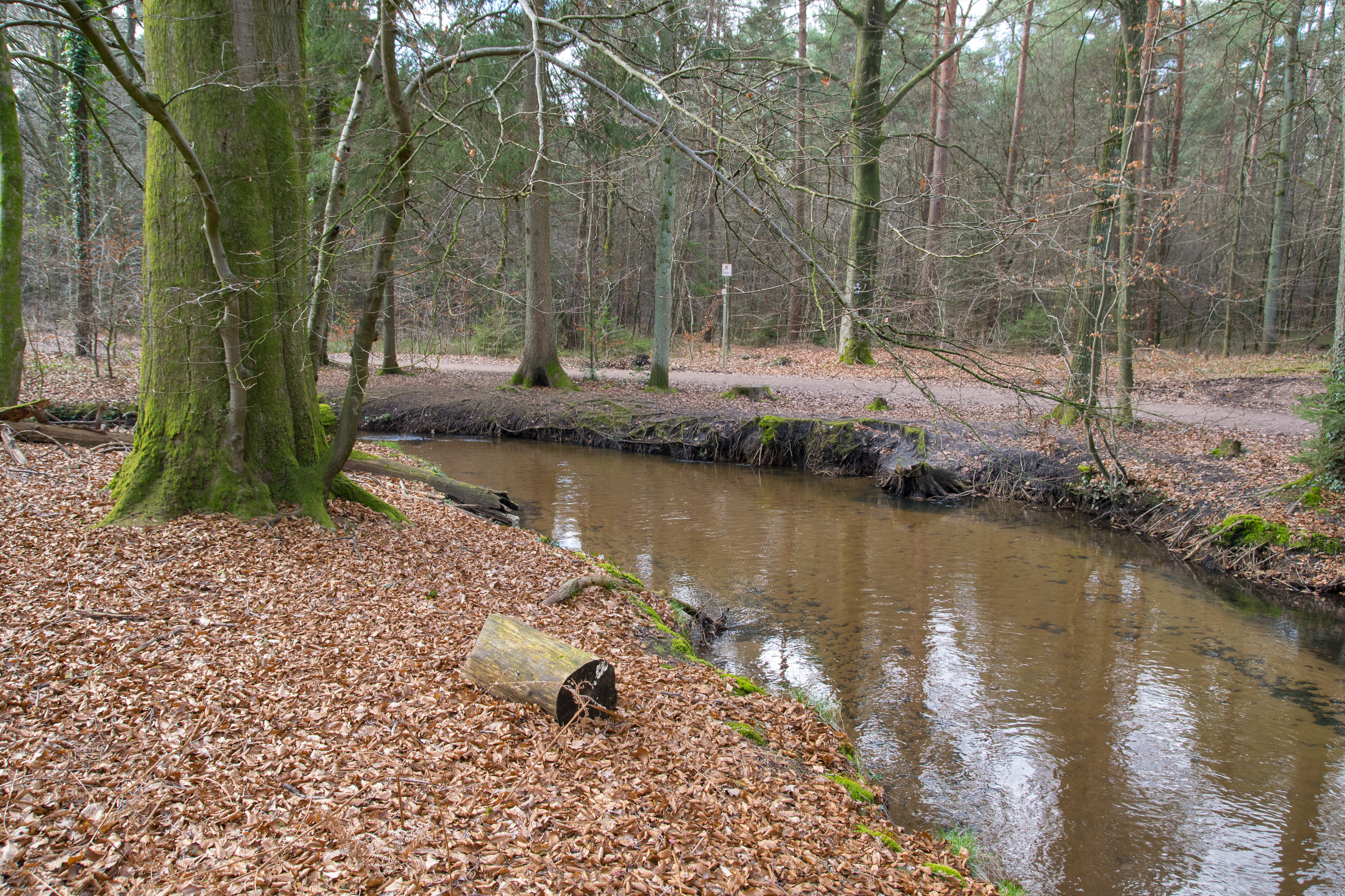 Ölbach im Naturschutzgebiet "Holter Wald", Schloß Holte, Kreis Gütersloh